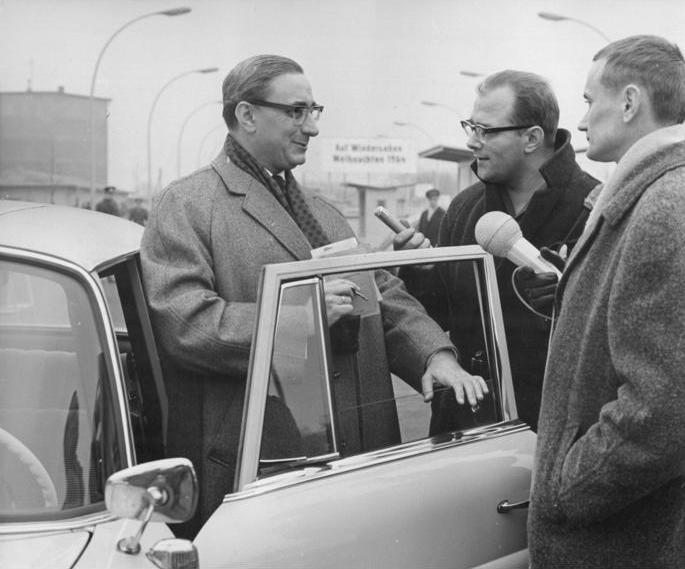 Zentralbild Hesse 6.11.1964 Westberliner CDU-Vorsitzender besuchte Hauptstadt der DDR Der Westberliner CDU-Vorsitzende Franz Amrehn, einer der schärfsten Gegner des Passierscheinabkommens zwischen der Regierung der DDR und dem Westberliner Senat, hat diese Übereinkunft am 6. November 1964 selbst zu einem Besuch der Hauptstadt der DDR ausgenutzt. DDR-Jourrnalisten inerviewtwn Franz Amrehn (links) am Berliner Kontrollpunkt Sonnenallee an der Staatsgrenze der von ihm so oft als "nicht existenten" bezeichneten DDR."